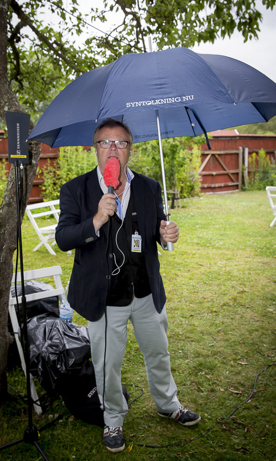 Att syntolka det fria kan kräva både paraply och förstärkare.